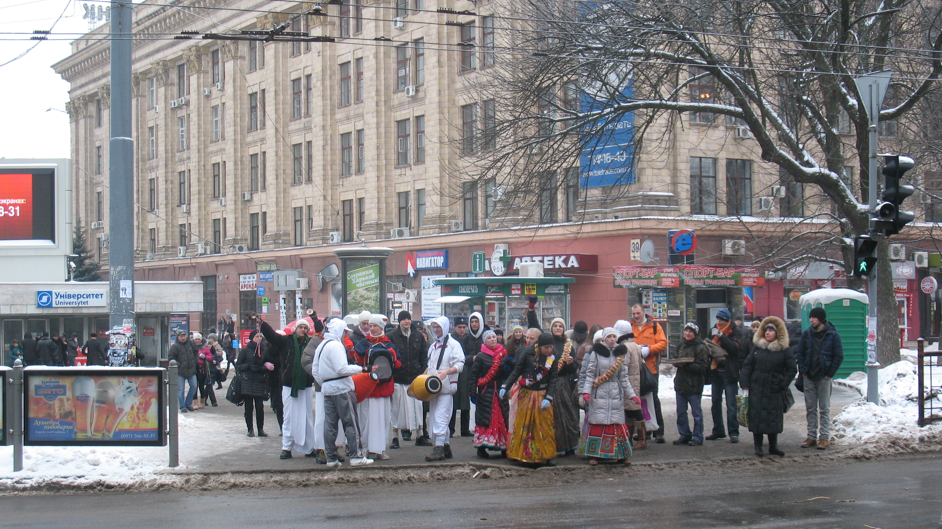 Zimní průvod Háre Krišna na Sumské ulici v Charkově